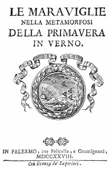 Mariano Auristuto e Barrese, A. Vitellaro, Padre Girolamo da Caltanissetta, Camillo Genovese e la cultura a Caltanissetta nell’Ottocento su Archivio Nisseno - Anno III, n°4 by Archivio Nisseno 110.